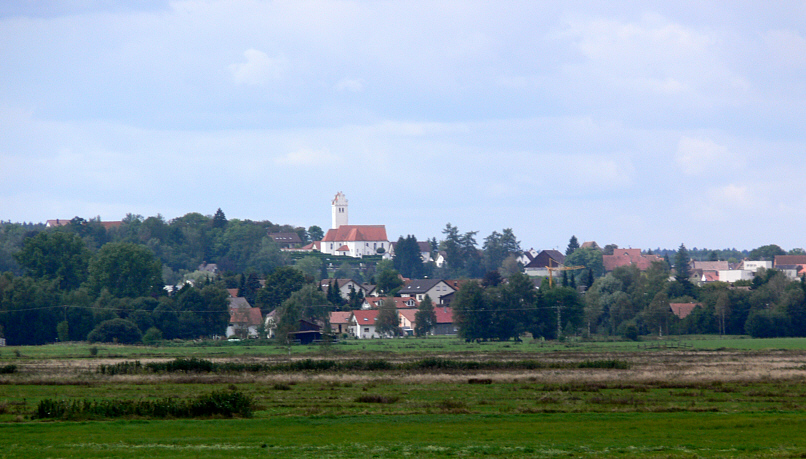 Skulpturenfeld Oggelshausen, Landkreis Biberach Blick nach Bad Buchau-Kappel